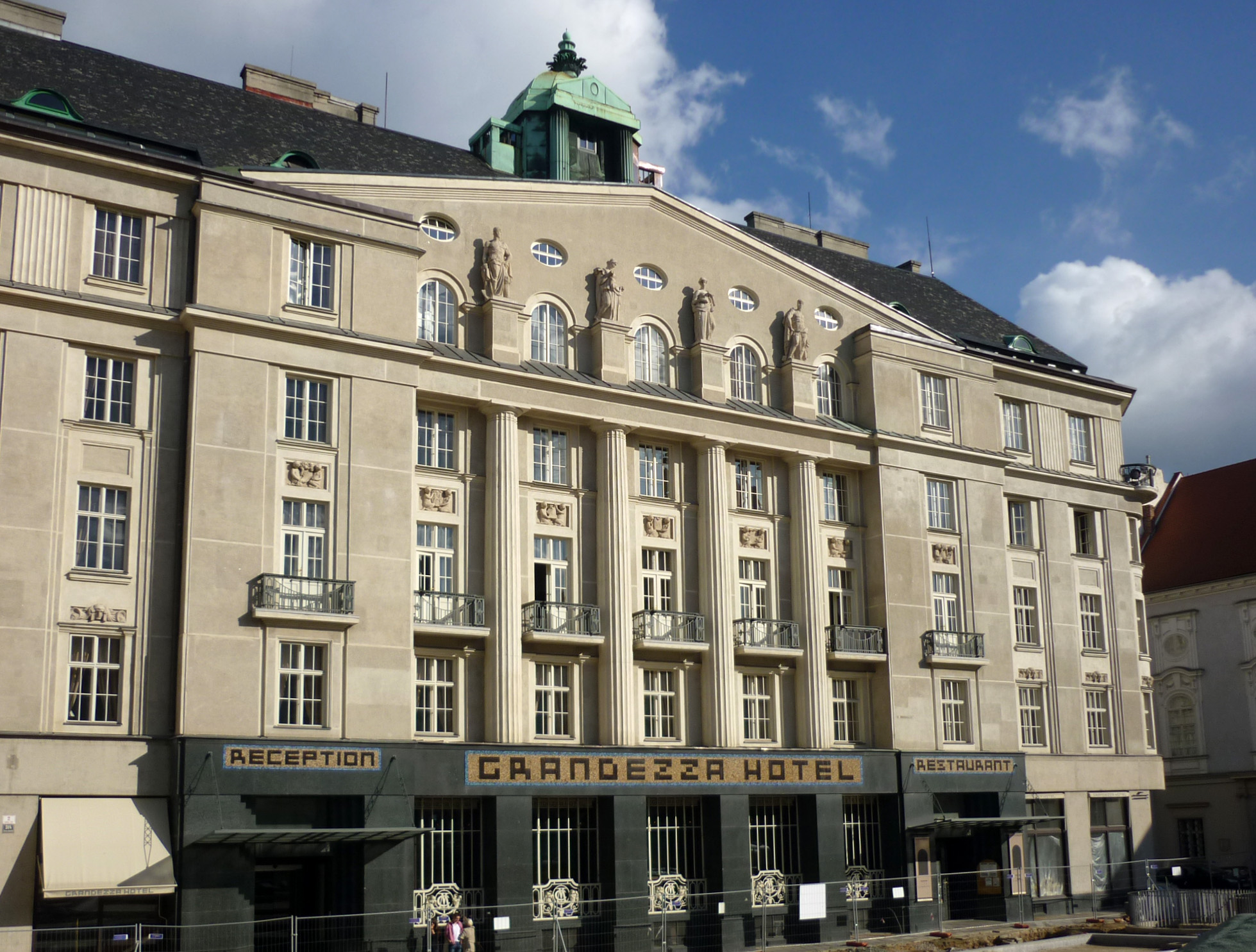 Grandezza-Hotel am Krautmarkt in Brünn (Brno)